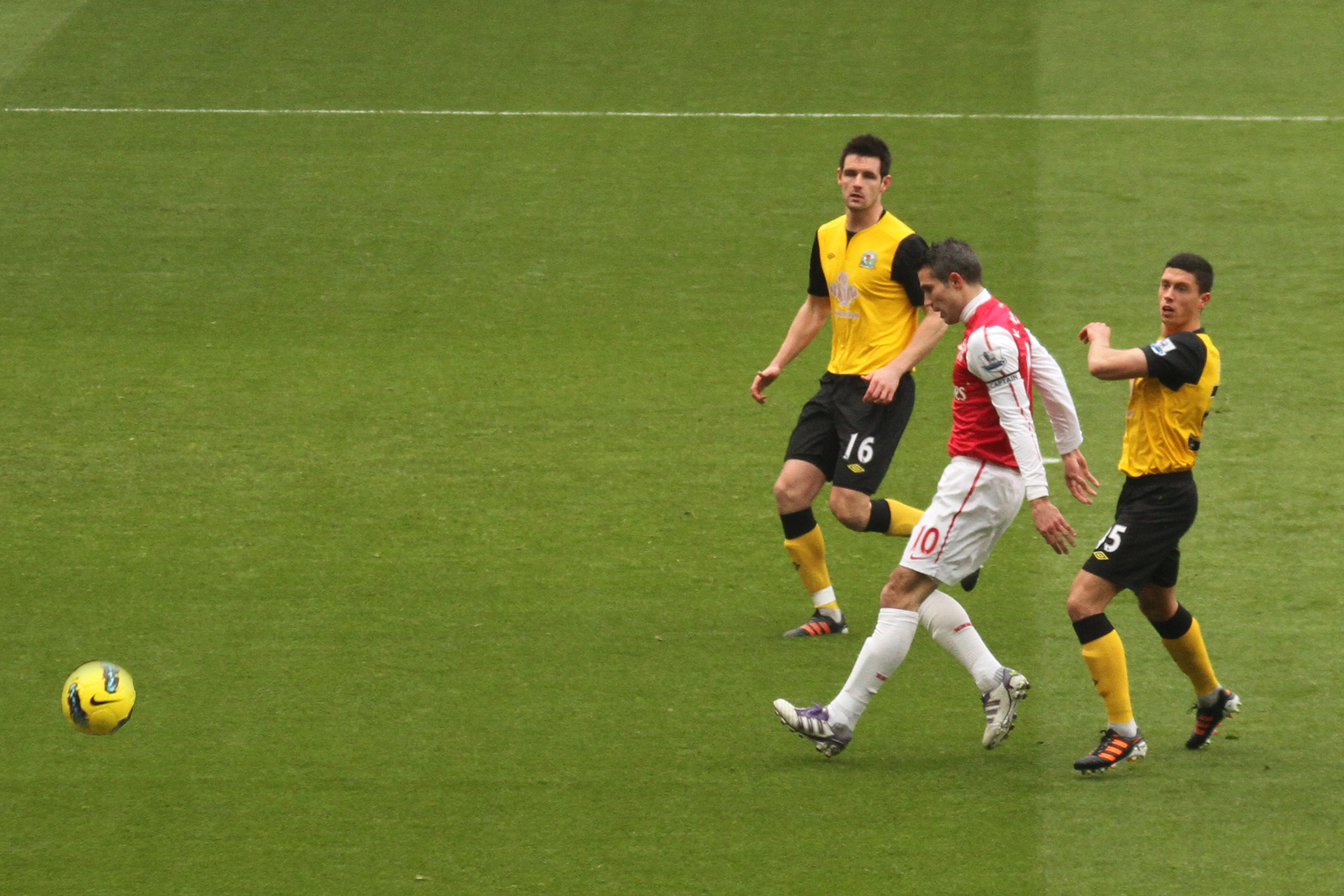 Robin Van Persie 4